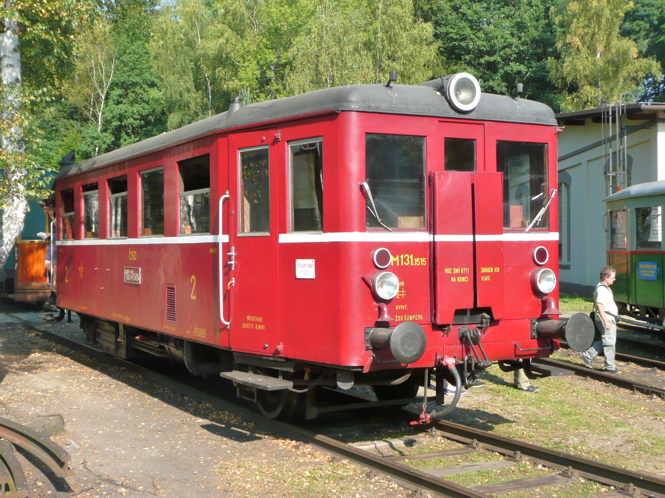 M 131 1515 in Luzna u Rakovnika